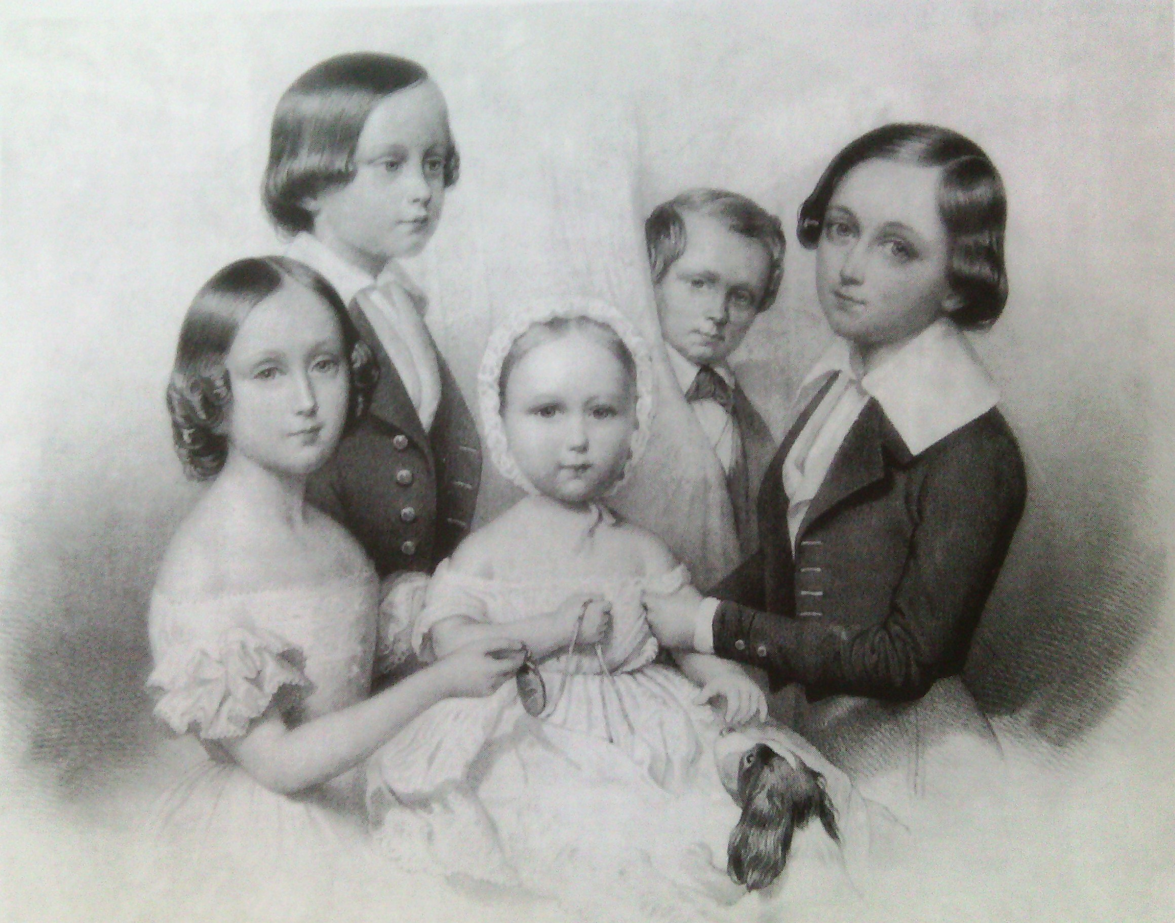 Дети графа Николая Дмитриевича Зубова (1801—1871) — Николай (1832—1898), Елизавета (1833—1894; в замужестве Гейден), Александра (1839—1877; в замужестве Анненкова) и Гавриил (1835—1891). Из-за портьеры выглядывает фигура карлика Тухты.